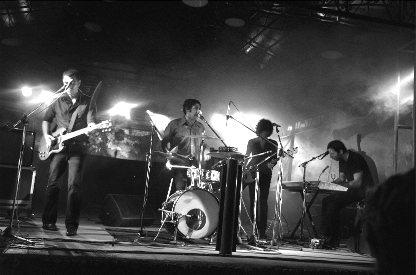 Bunnyranch - Portugal - Santa Maria da Feira - Lamas - 24 de Setembro de 2005 - Foto de J.P. Casainho